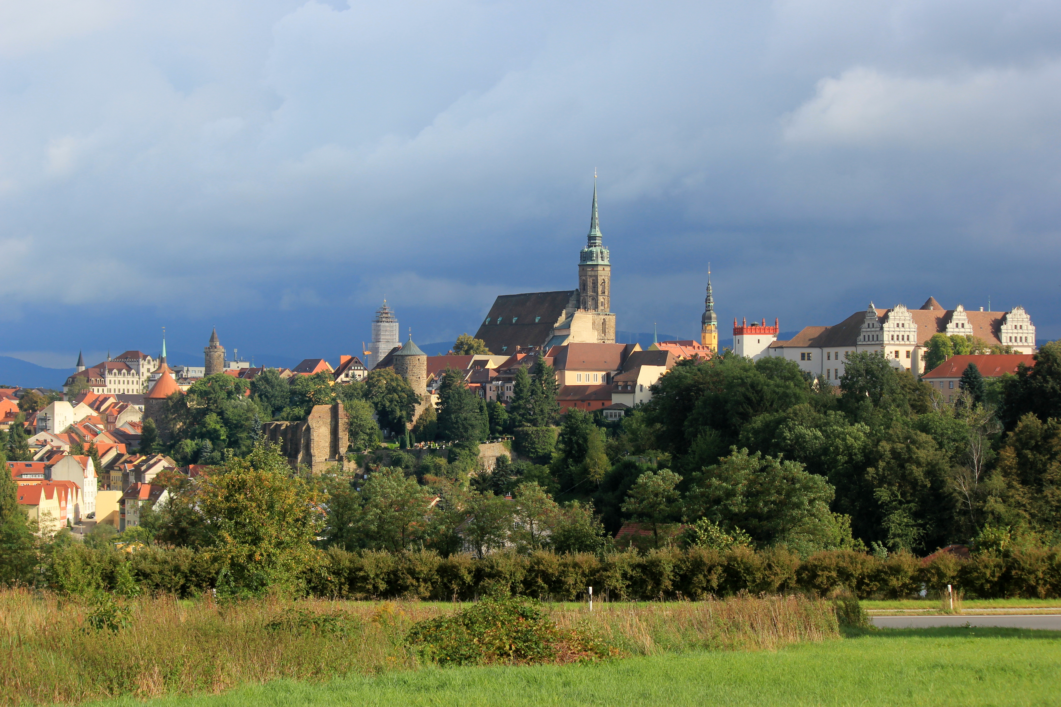 Hornjoserbsce: Napohlad Budyšina z Homole při zwjazkowej dróze 96.